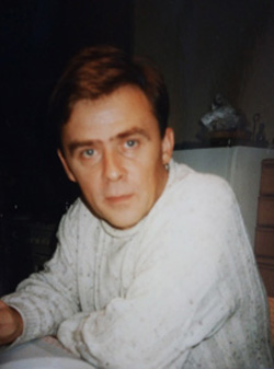 Слика за чланак Андреј Стојановић